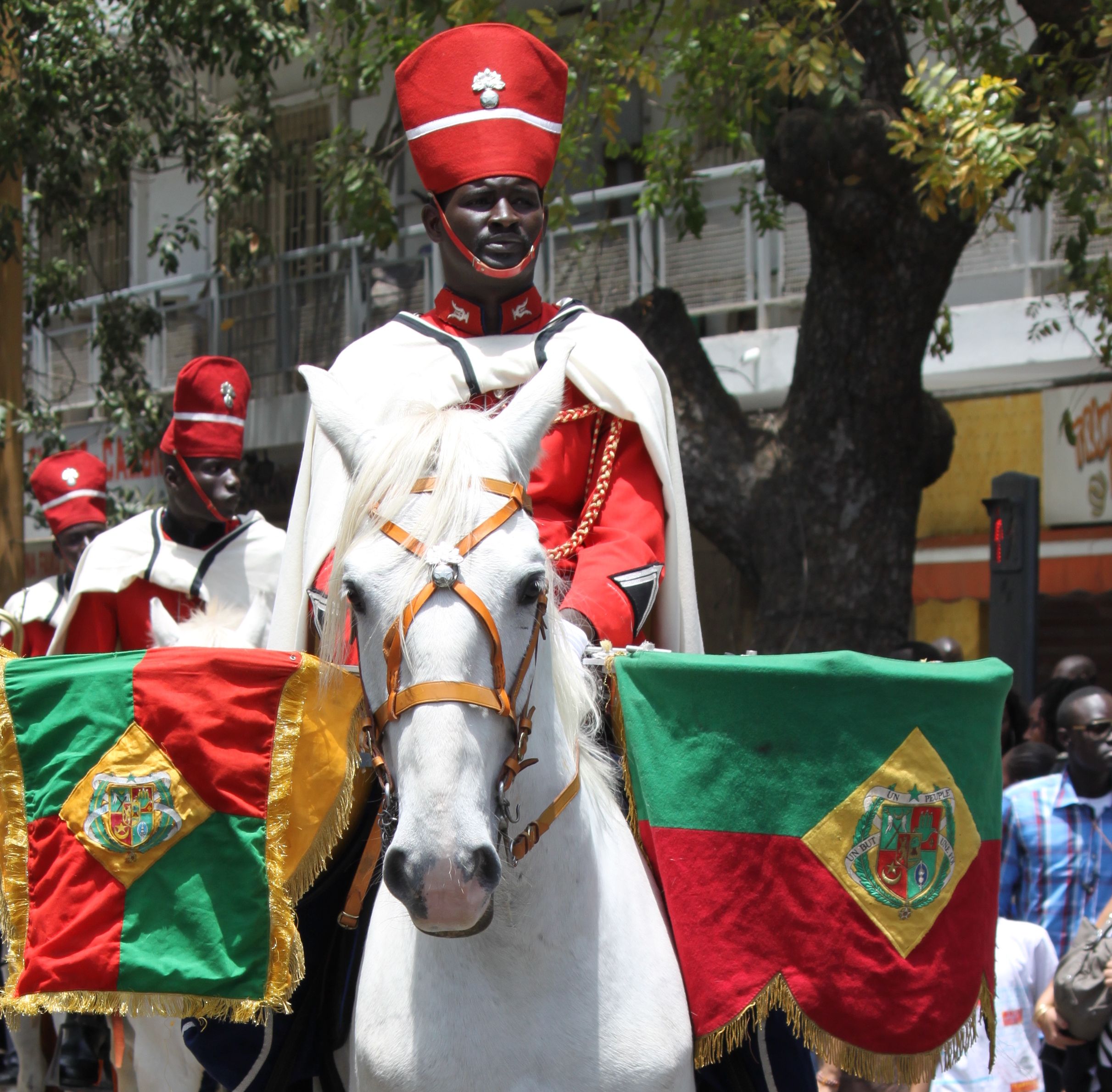 Spahis sénégalais lors de l'Investiture de Macky Sall à Dakar, Sénégal, le 2 avril 2012.